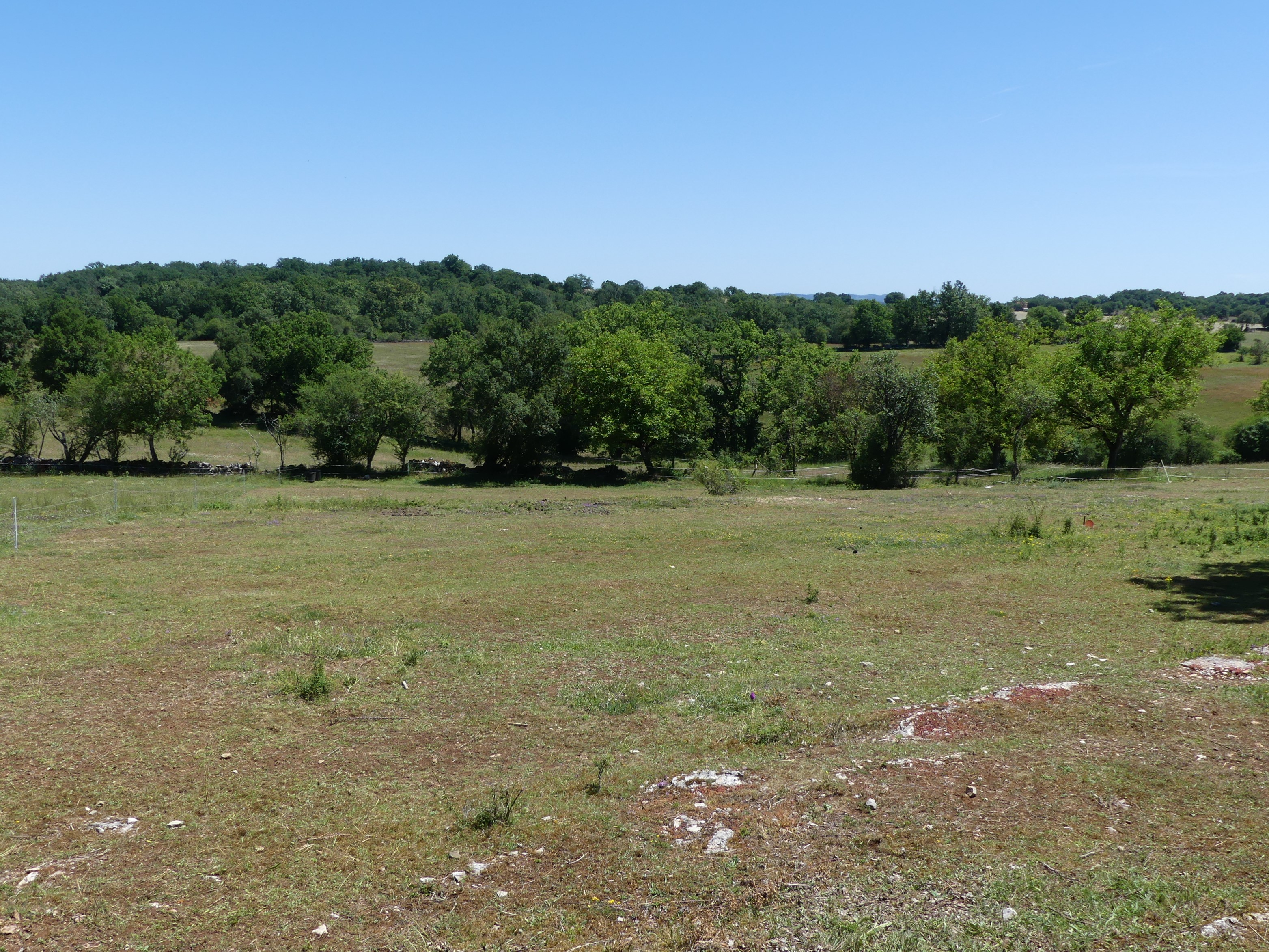 Paysage en bordure du hameau de Ladignac, commune de Durbans, Lot, France.